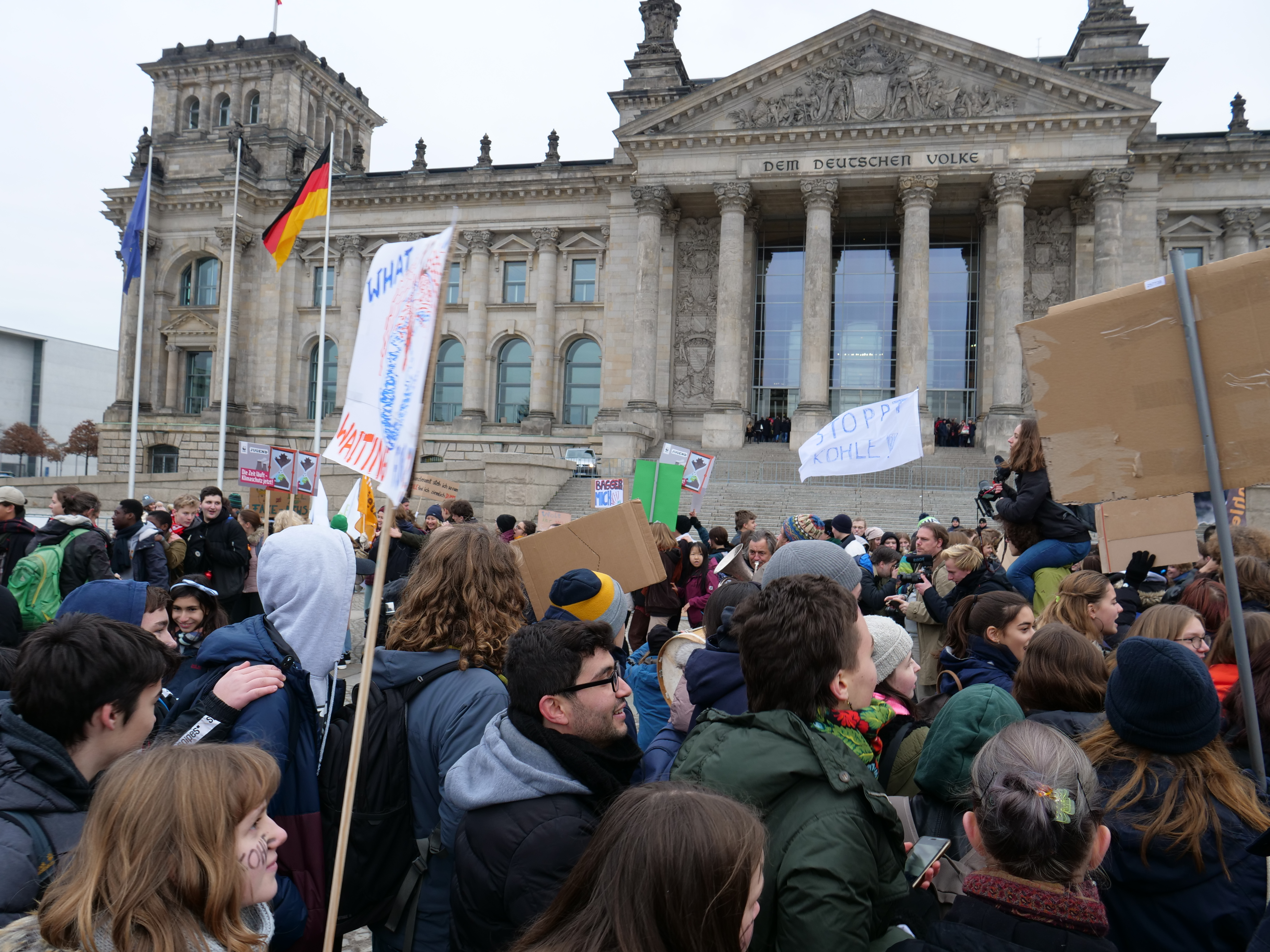 Unter dem Motto "#FridaysForFuture" und "Climate Strike!" streikten insbesondere Schülerinnen und Schüler vor dem Reichstagsgebäude in Berlin.